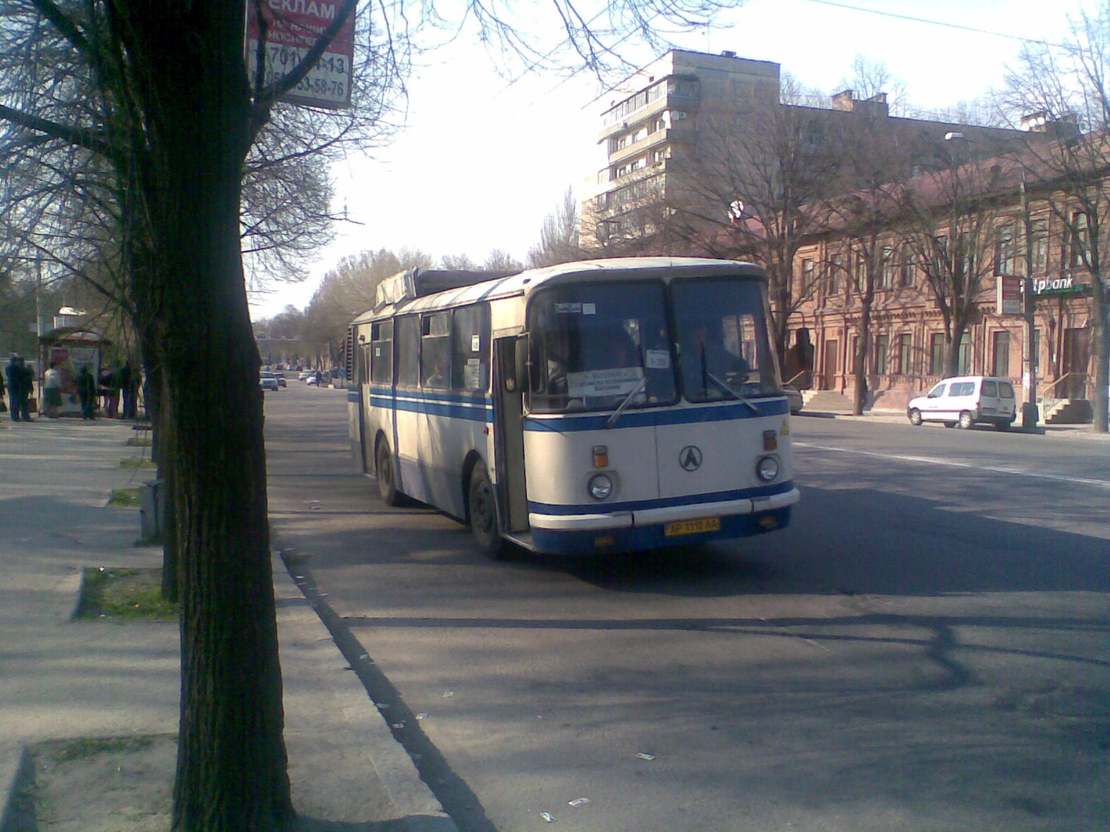 Этот ЛАЗ знал лучшие времена... Но жёлтый цвет номеров говорит о том, что ему удалось подтвердить статус средства перевозки пассажиров, а баллоны с газом, установленные на крыше - сделать город немного чище, а эксплуатацию - рентабельнее (цена проезда 1,25 грн., а не 2,0 как в маршрутных такси).